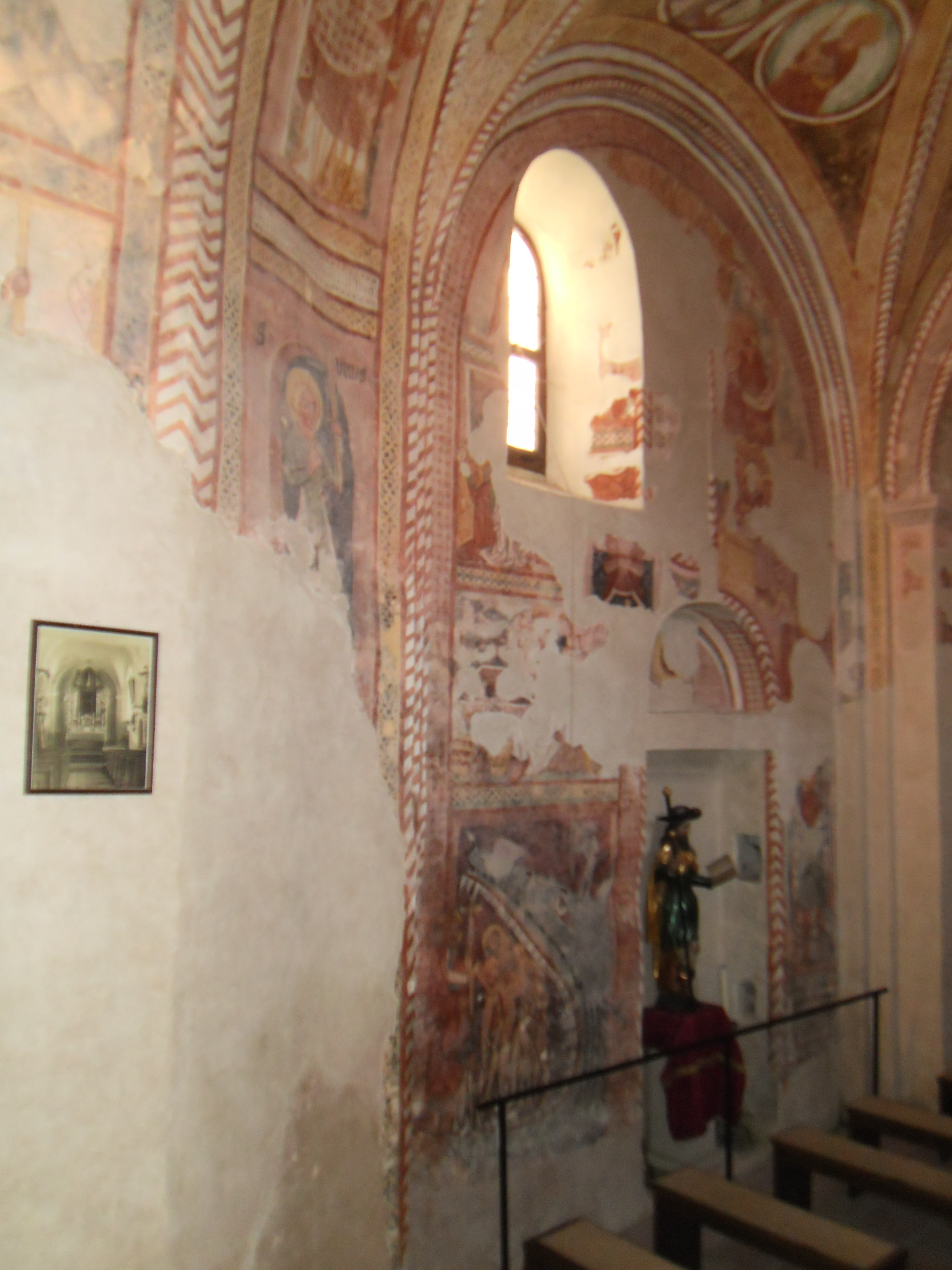 Kirche St. Jakobus in Urschalling, Gemeinde Prien am Chiemsee; Fragmente von Fresken an der linken Innenwand des Kirchenschiffs,in der Nische des ehemaligen Eingangs eine den hl. Jakobus darstellende Schnitzfigur.